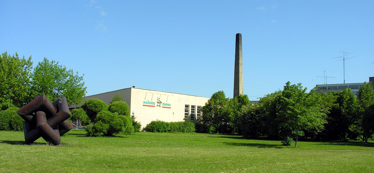 UAB Mažeikių duona Foto: Algirdas, 2006 m. birželio 14 d.